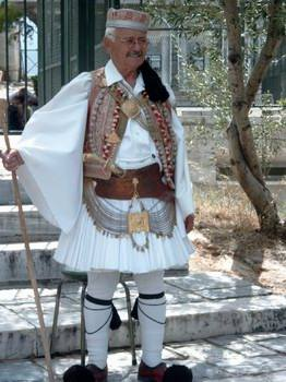 Evzonen